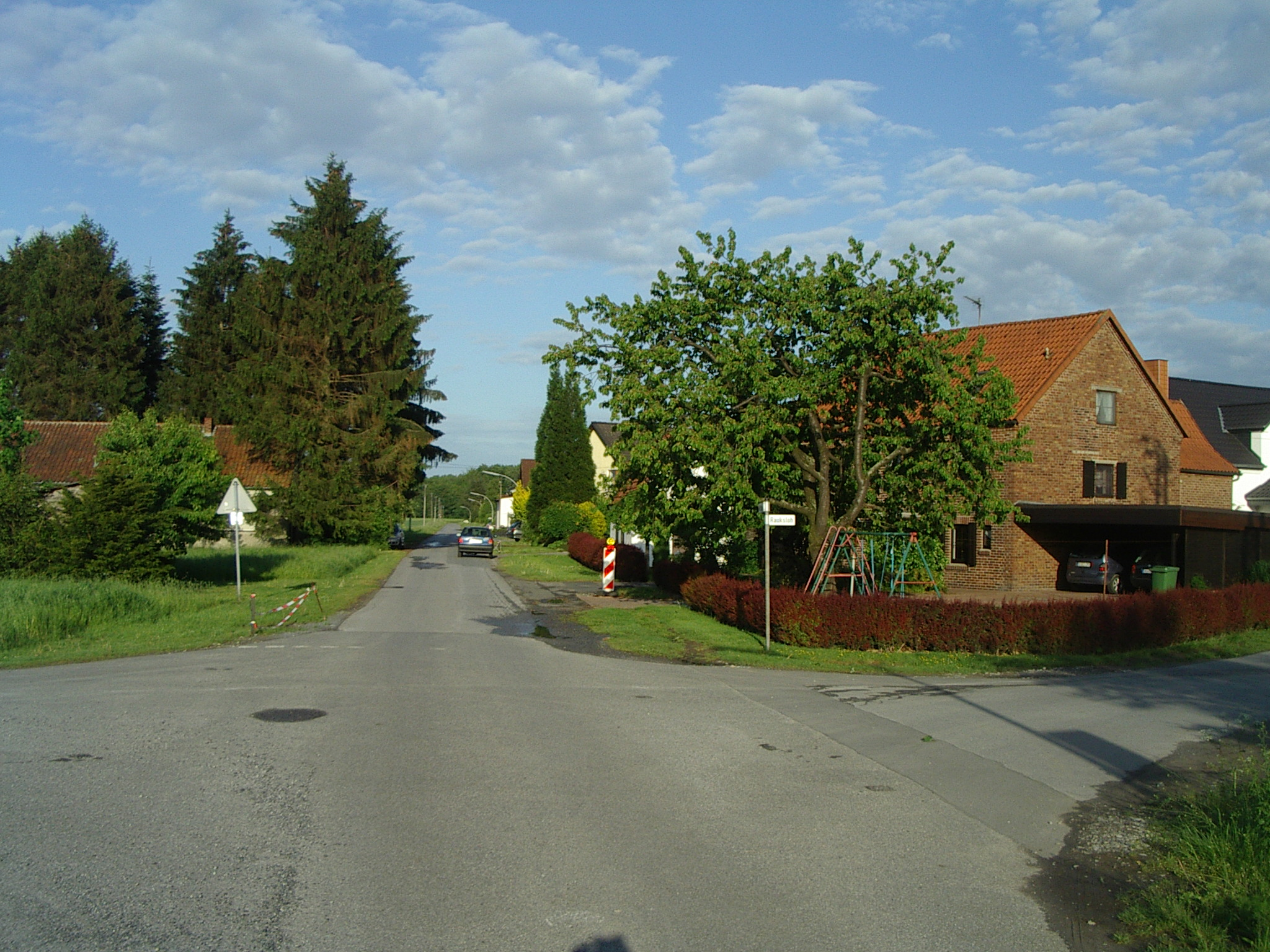 Kreuzung in Dorfwelver